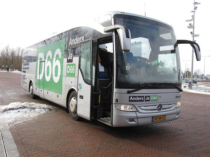 D66-spelersbus GR2010